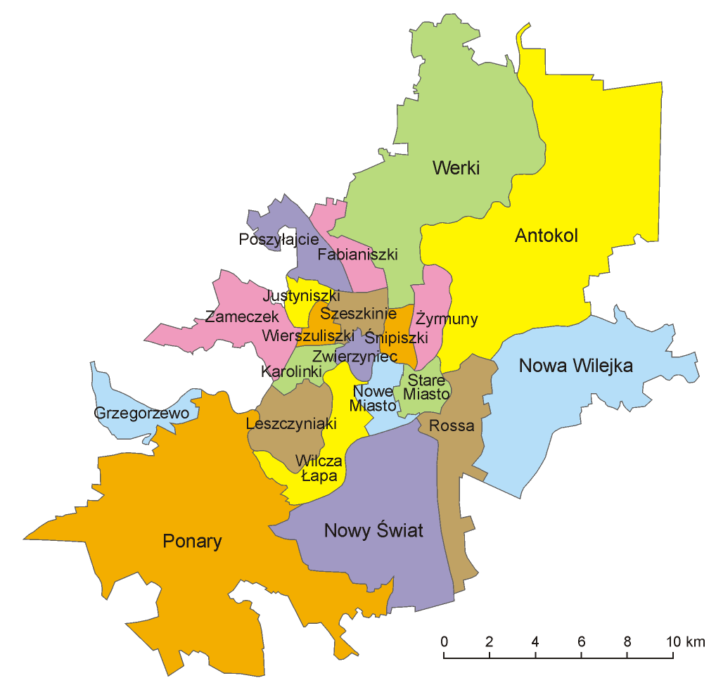 Dzielnice Wilna